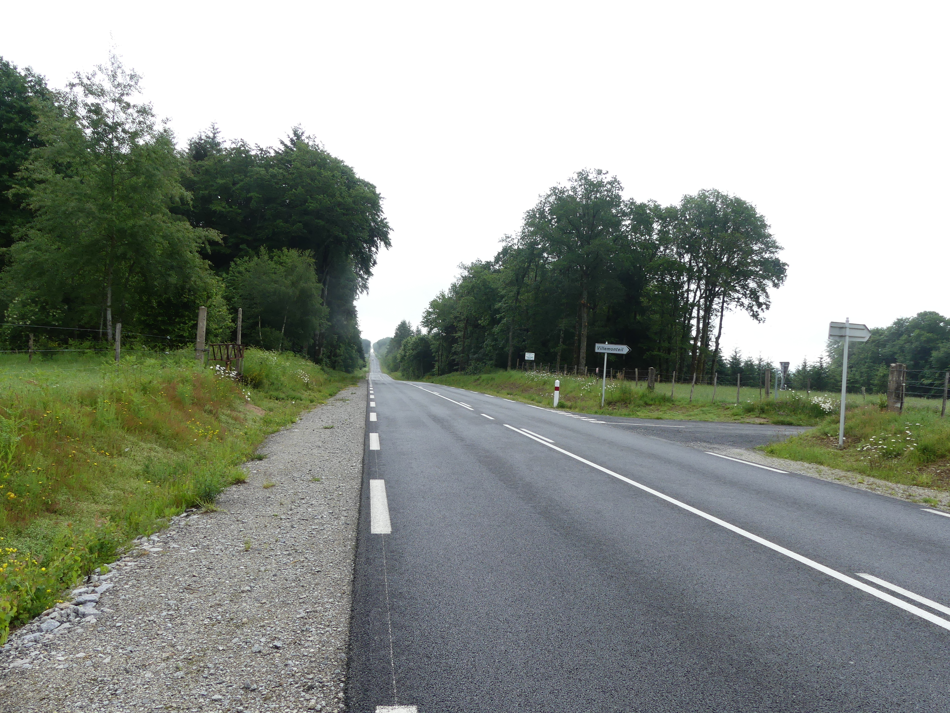 La route départementale 941 au niveau de l'embranchement vers Villemonteil, Chavanat, Creuse, France.